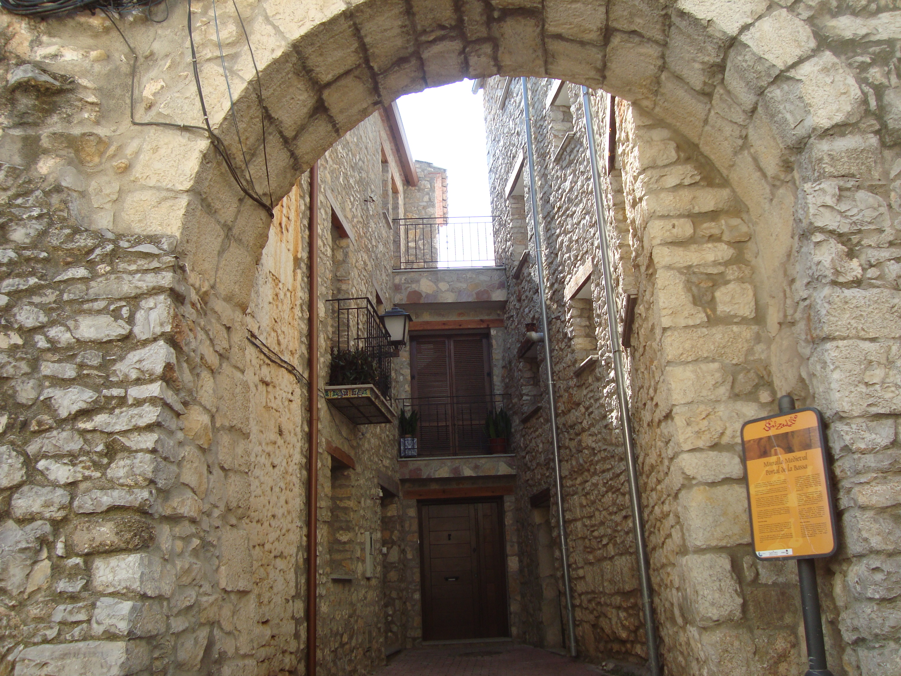 Muralles de la Salzadella 03.098-002.